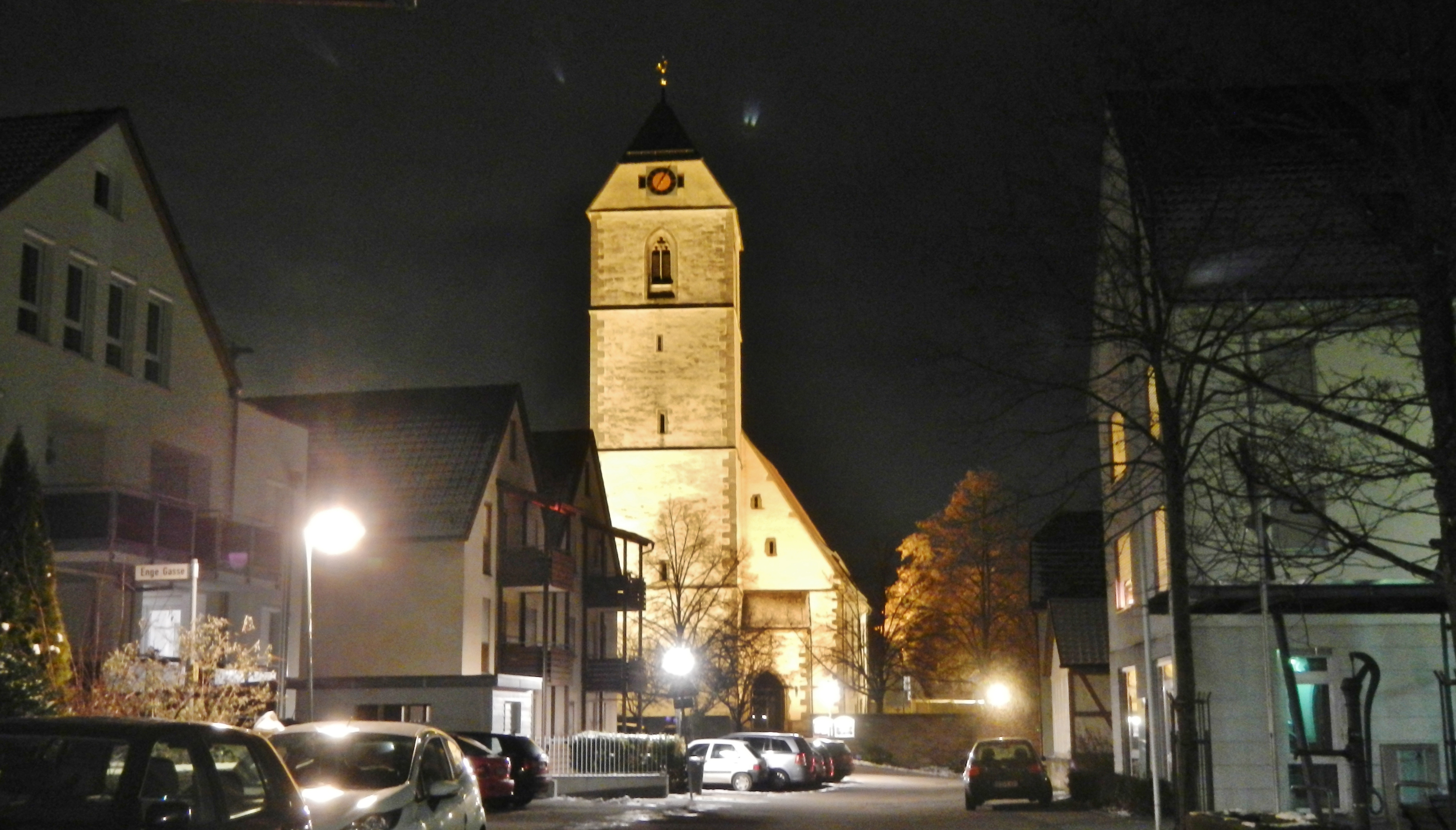 Evangelische Kirche in Gärtringen